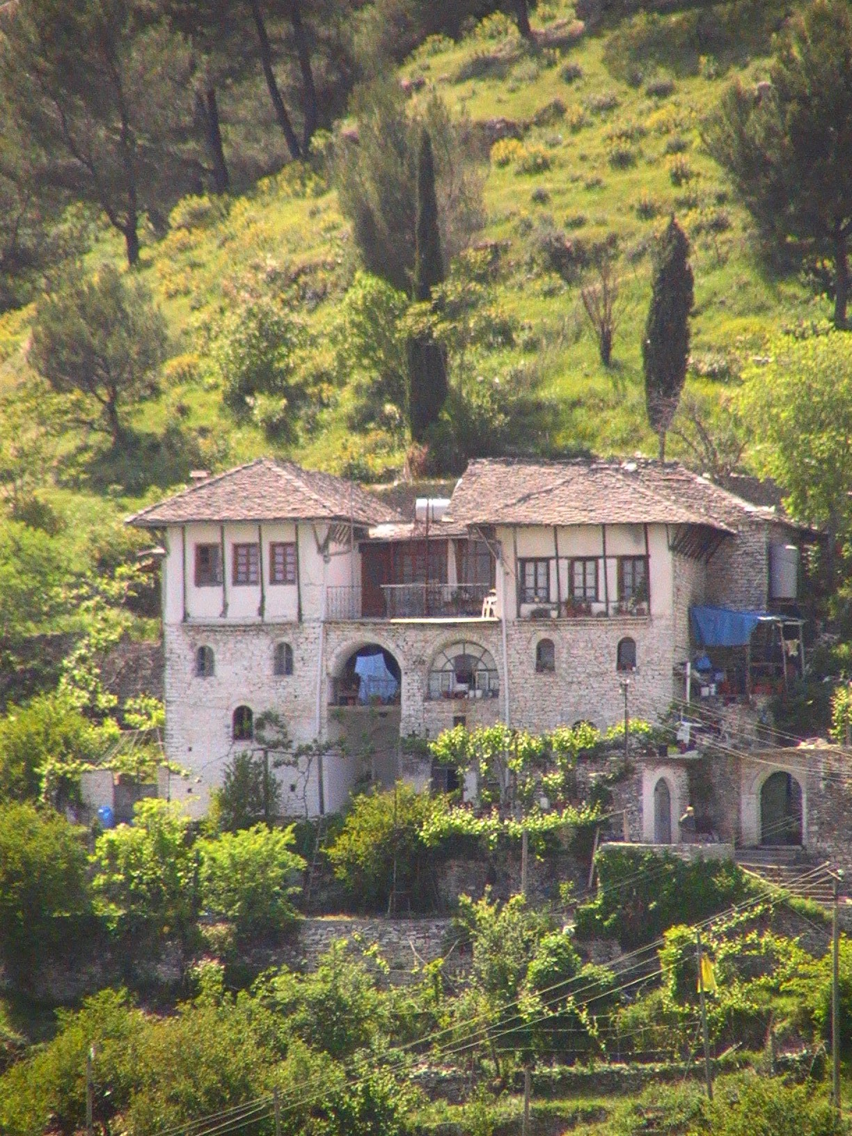 A house in Gjirokastër, Albania